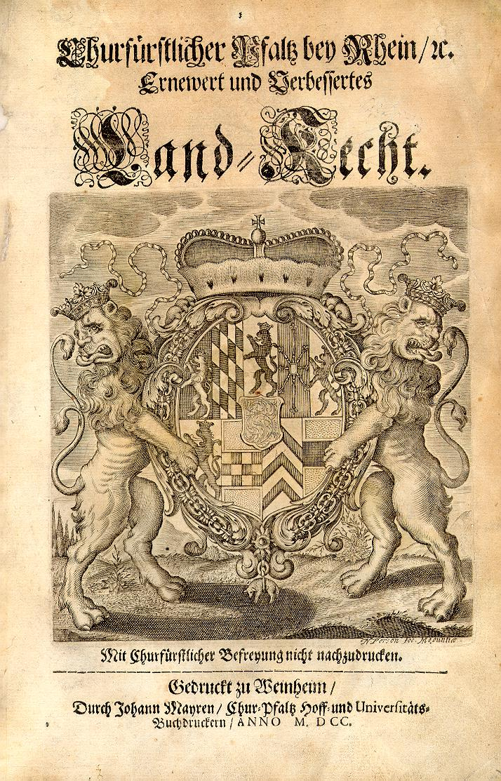 Churfürstlicher Pfaltz bey Rhein etc. Ernewert und Verbessertes Land-Recht.